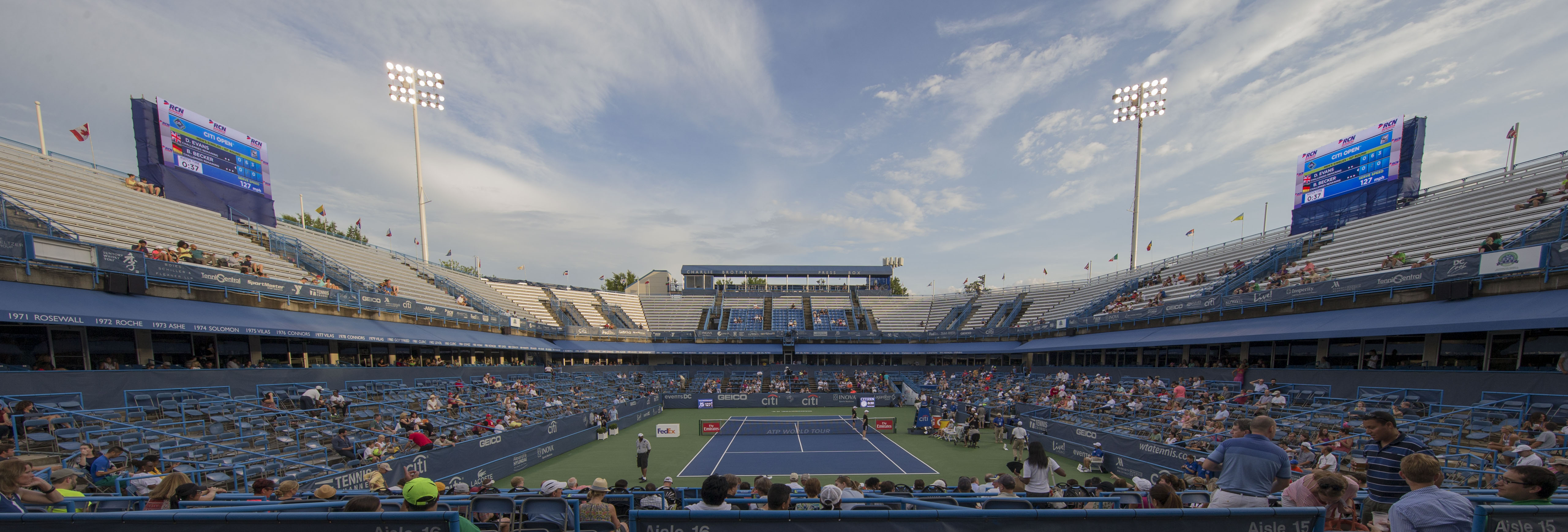 2016 Citi Open